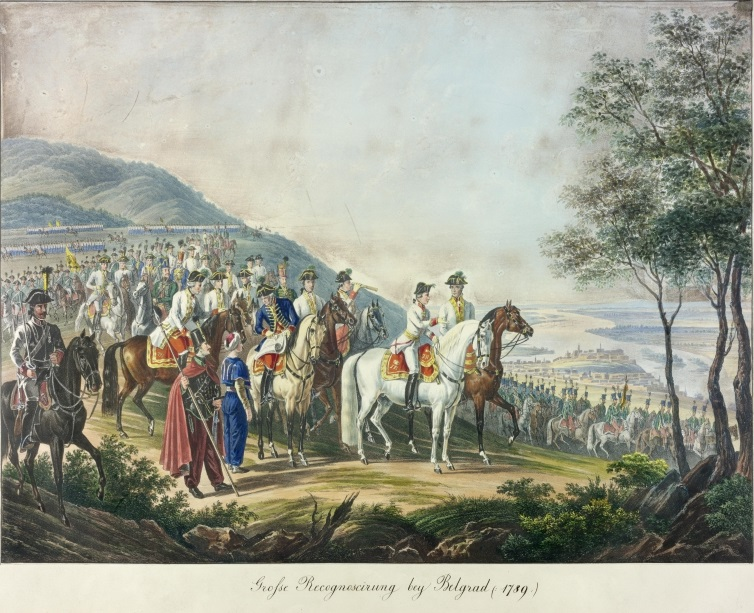 Erzherzog Franz, der spätere Kaiser Franz II. / I., rückt zusammen mit General-Feldmarschall Baron Laudon an der Spitze des Heeres vom Berg Avala gegen Belgrad vor. Lithographie von Franz Wolf nach einer Vorlage von Johann Nepomuk Hoechle, aus der Serie „Hauptmomente aus dem Leben Sr. Majestät Franz I.“